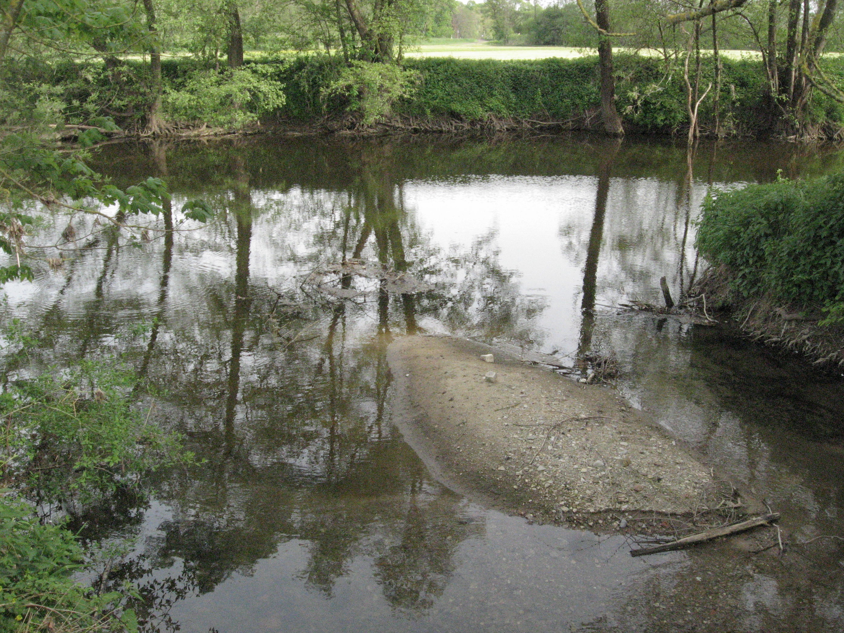 Mündung der Bibers (von rechts unten) in den Kocher (von rechts nach links) bei Rosengarten-Westheim. Die Bibers, 200 m weiter talauf noch mit Gefälle, lebhaft und insellos fließend, wirft bei Erreichen des hier träge dahinfließenden Kochers einen Teil ihrer Sedimentfracht ab, die erst wieder bei größerer Wasserführung des Kochers fortgeschwemmt wird. Blick nach SSE.